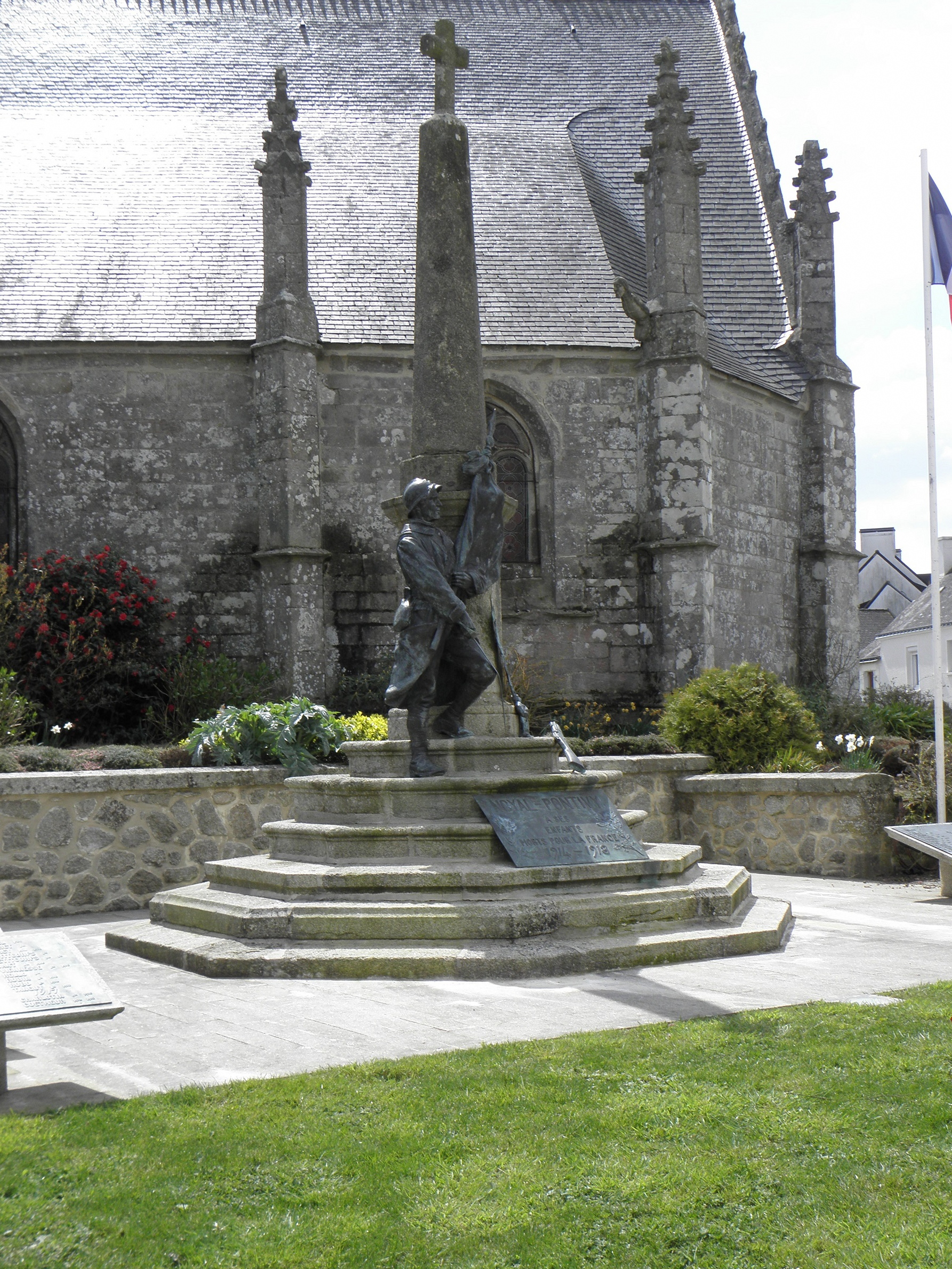 Monument aux morts et costale nord de la nef de l'église Sainte-Noyale de Noyal-Pontivy (56).